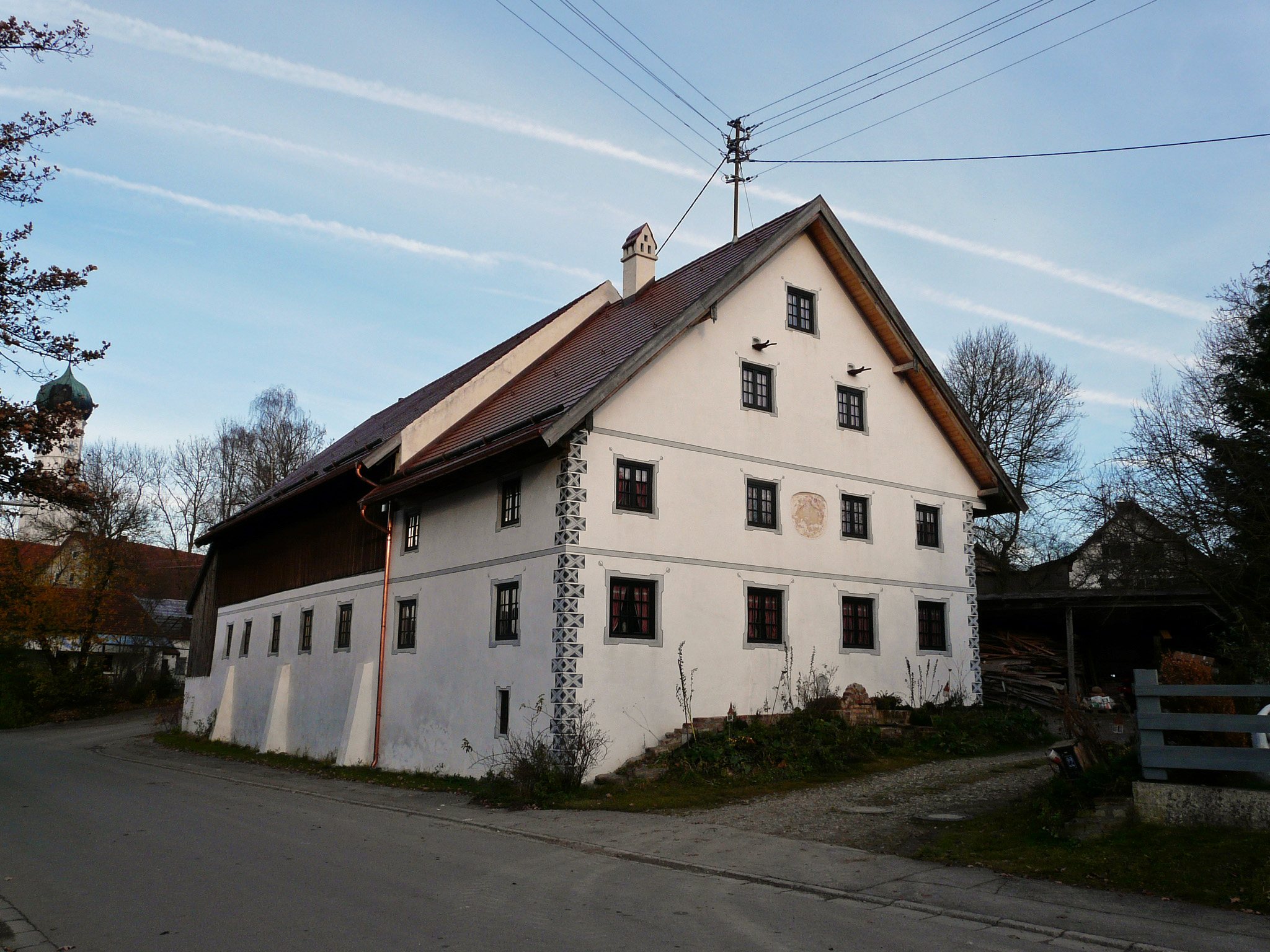 Singoldstr. 22 in Großkitzighofen, Lamerdingen